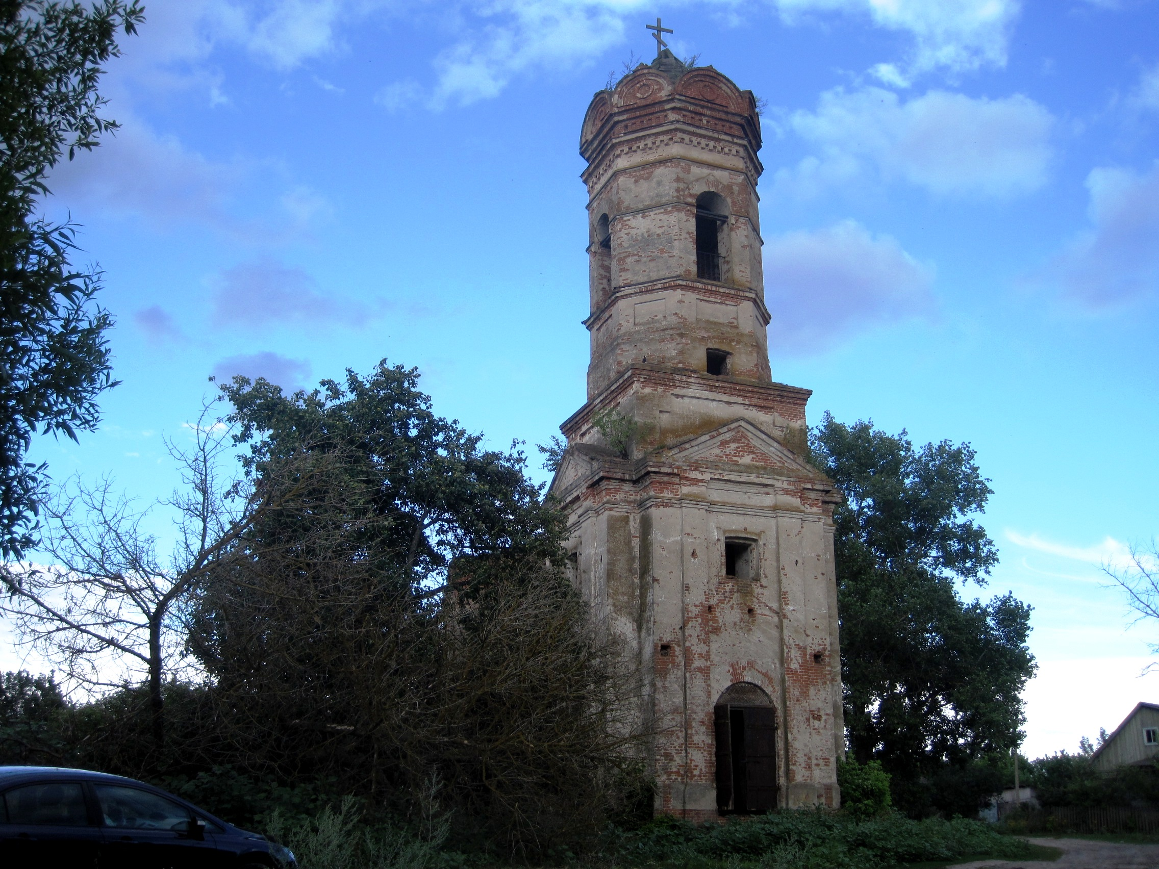 Руїни дзвіниці храму Різдва Богородиці. Церква з дзвіницею були побудовані у 1904 році на місці старої церкви. В радянський час церква була закрита. Приміщення використовували як склад. В 60-тих роках минулого століття церкву підірвали. На даний час залишилася дзвіниця, яка уціліла після вибуху.